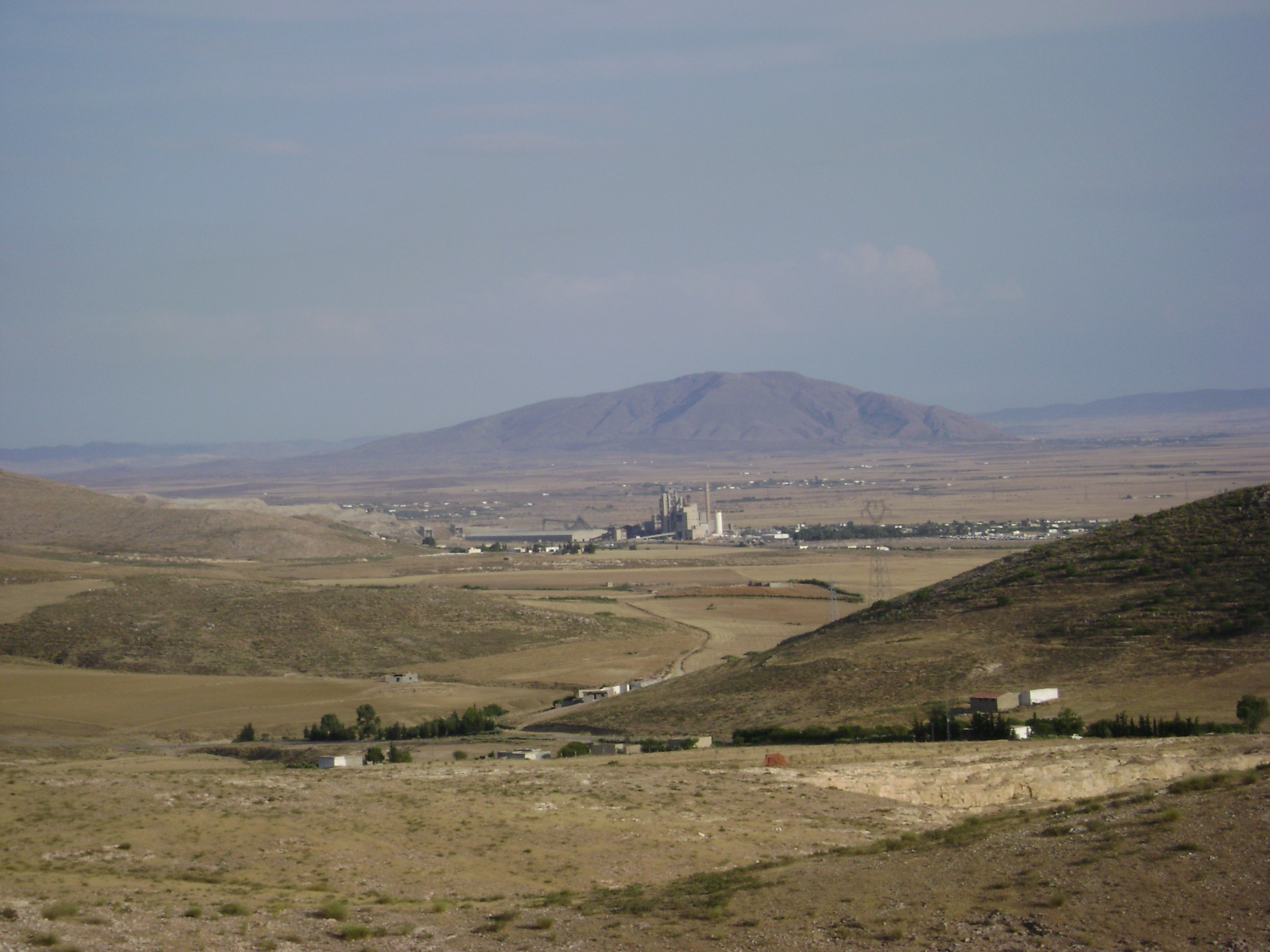 Cimenterie d'Oum El Khélil (près de Tajerouine)